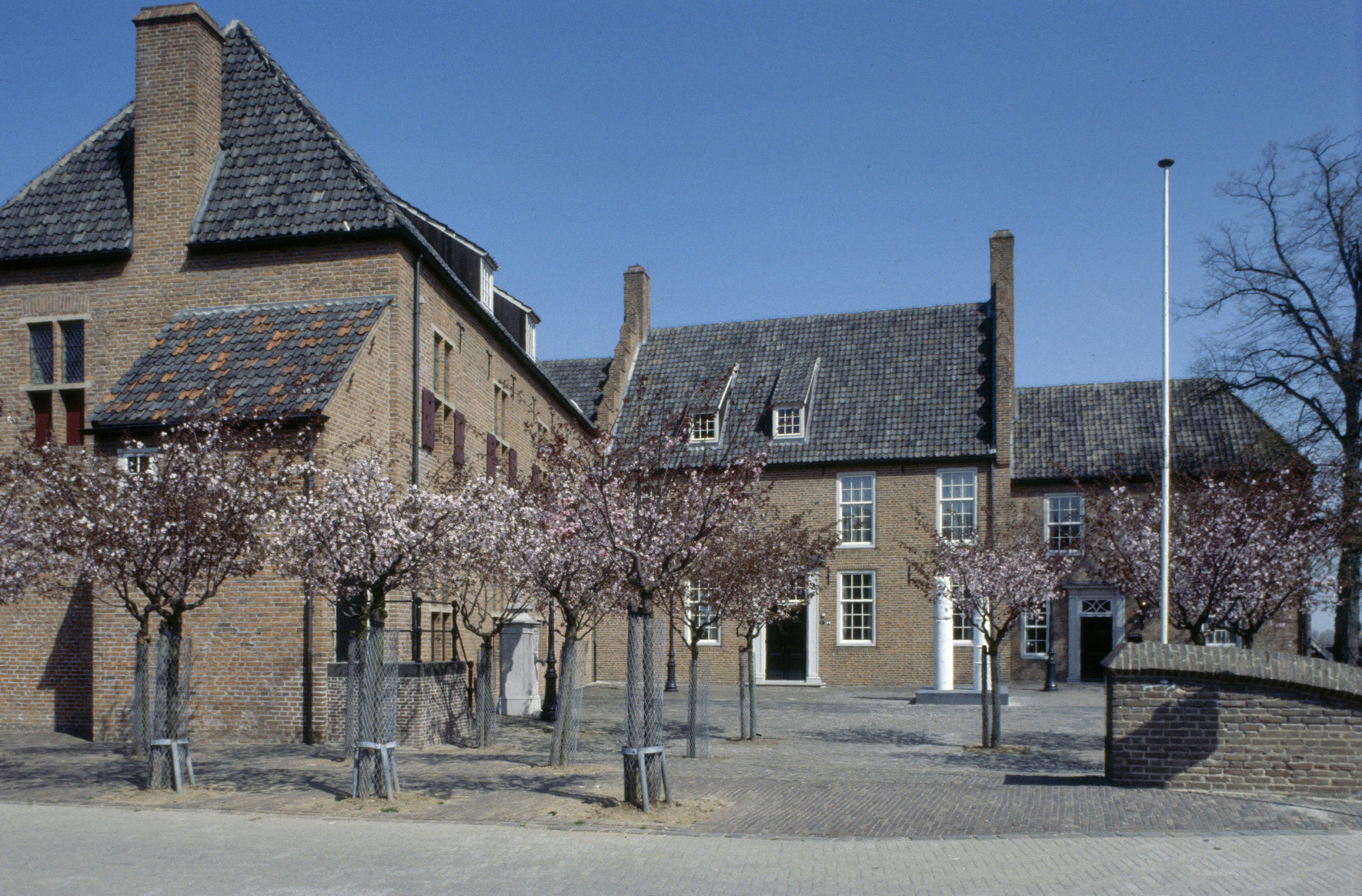 COMMANDERIJ SINT JAN: Exterieur gevels aan de Franse Plaats